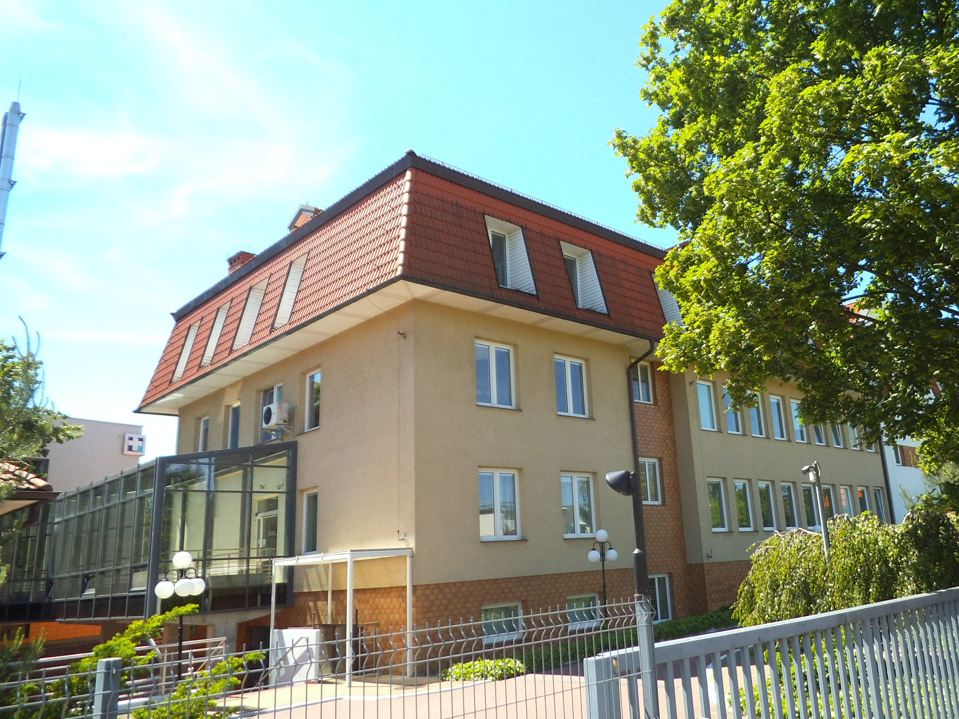 Szpital Specjalistyczny Matopat w Toruniu2